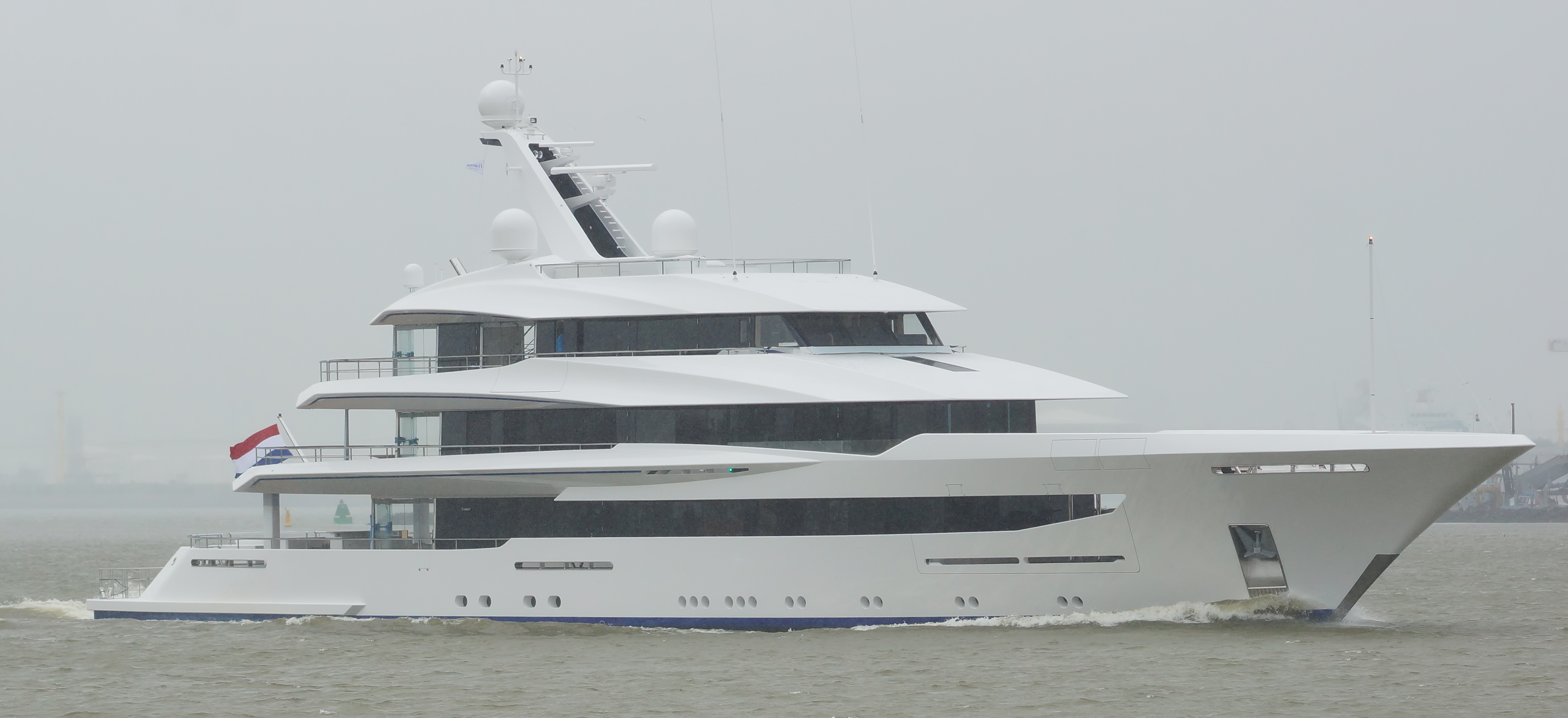 Nieuwe Waterweg 20-6-2016 . JOY gebouwd bij Feadship onderweg naar Europoort voor proefvaart.